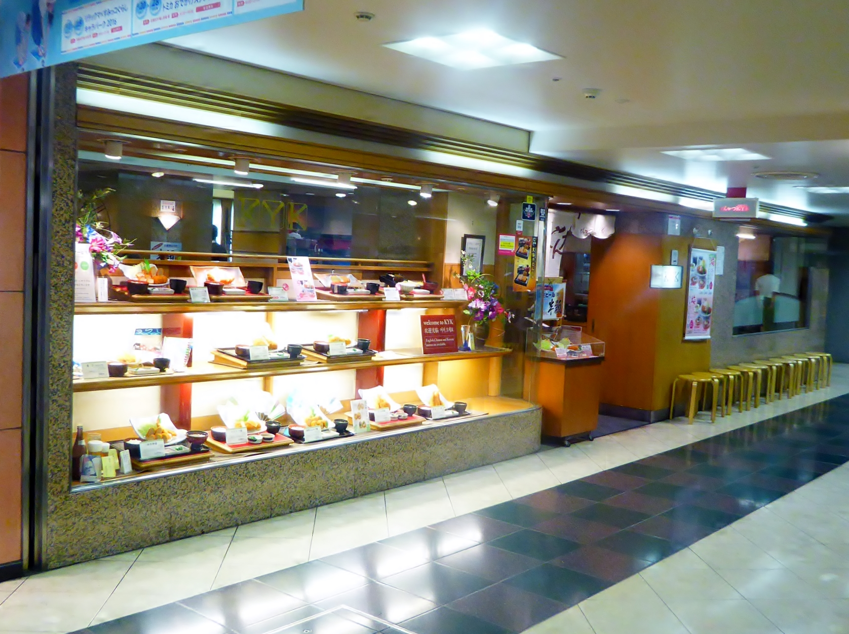 とんかつKYK阪急三番街店を撮影。